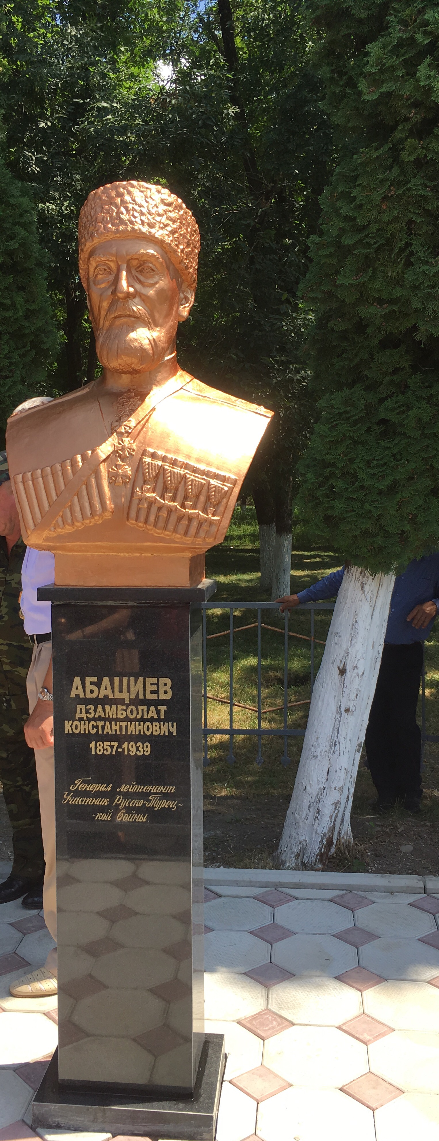 В северной-Осетии в Селении Кадгарон Открыли Мемориал Генералу от Кавалерии Абациеву, Дмитрию-Дзамболату Константиновичу